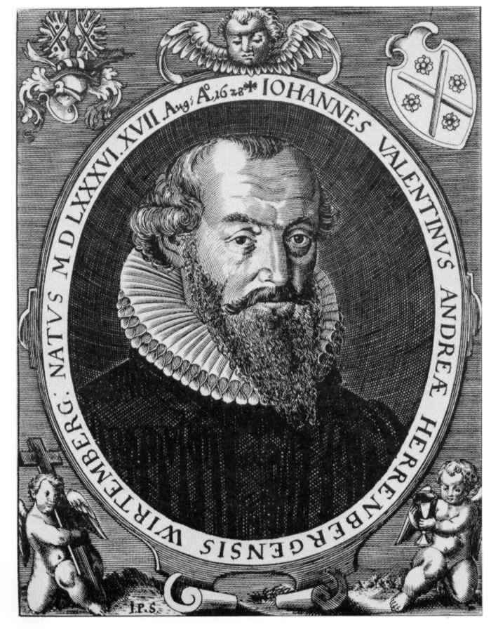 Johann Valentin Andreae w wieku 42 lat.